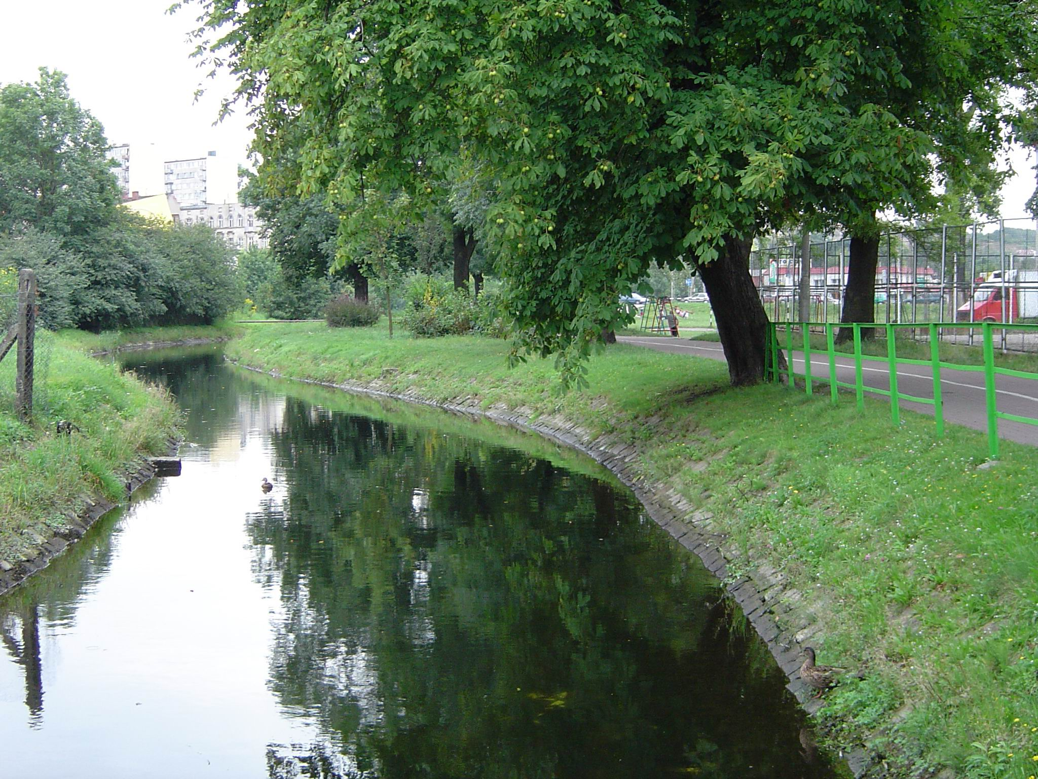 Kanał Trynka w Grudziądzu